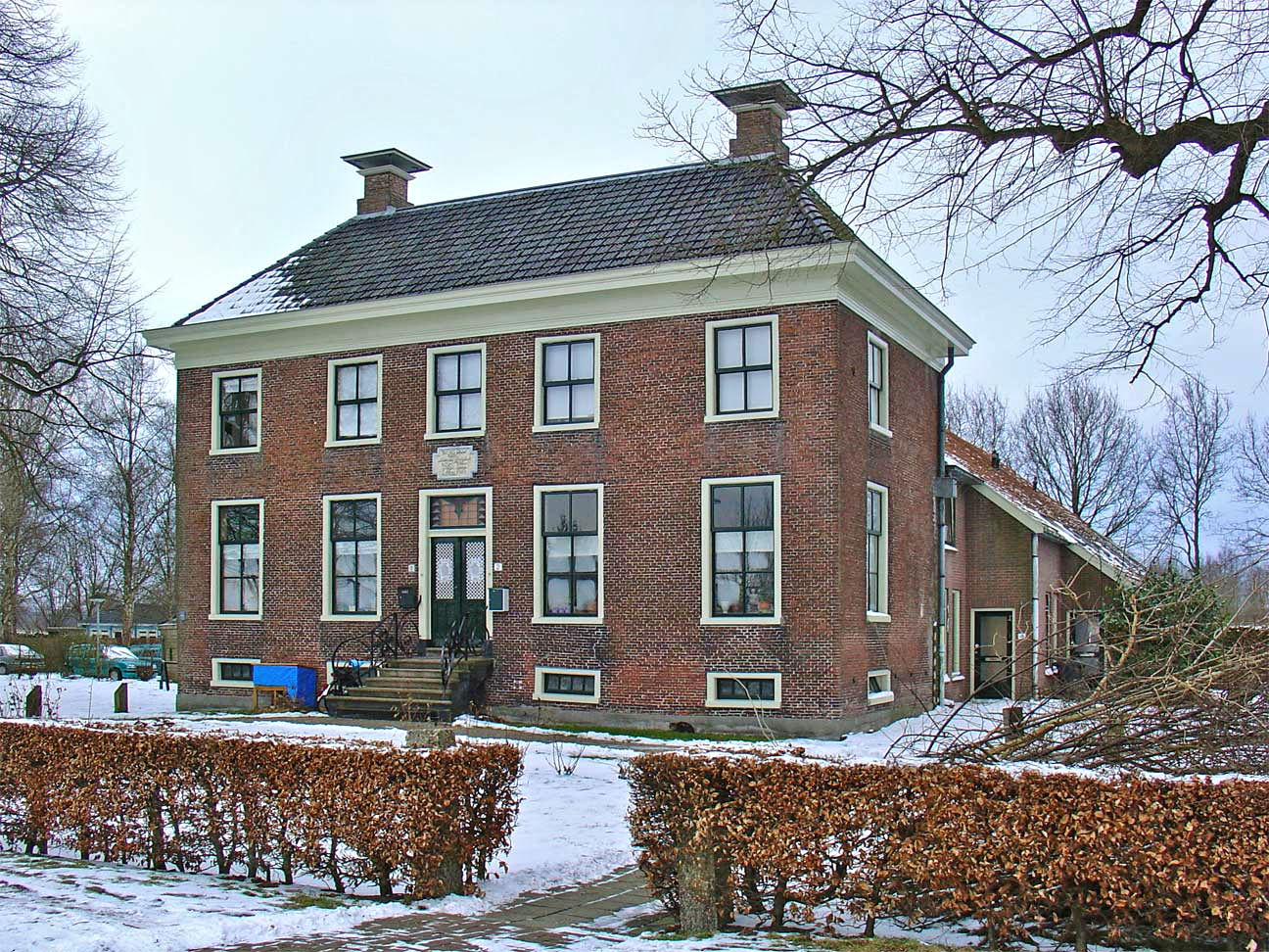 Grevijlinkhuis in Annerveenschekanaal anno 2010